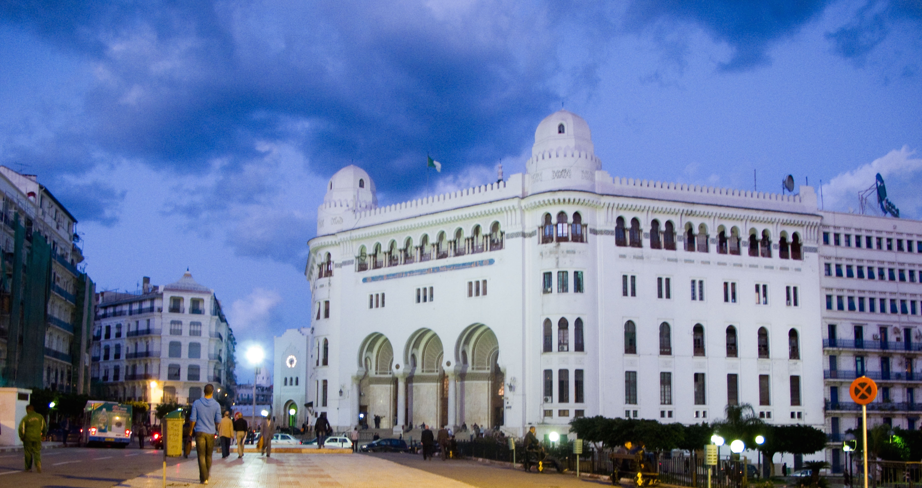 Grande-Poste, Alger, Algérie